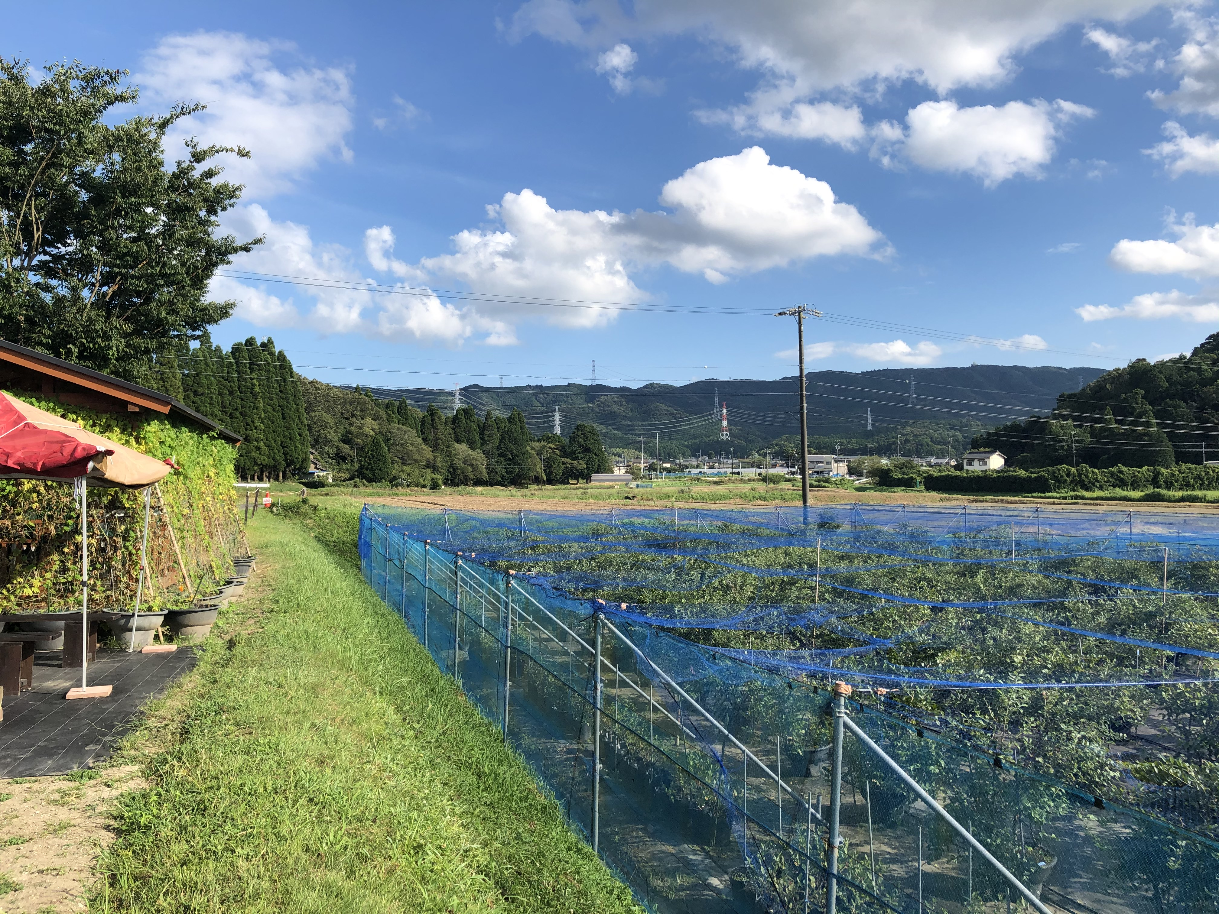 ブルーベリーファームおかざき（岡崎市桑谷町）